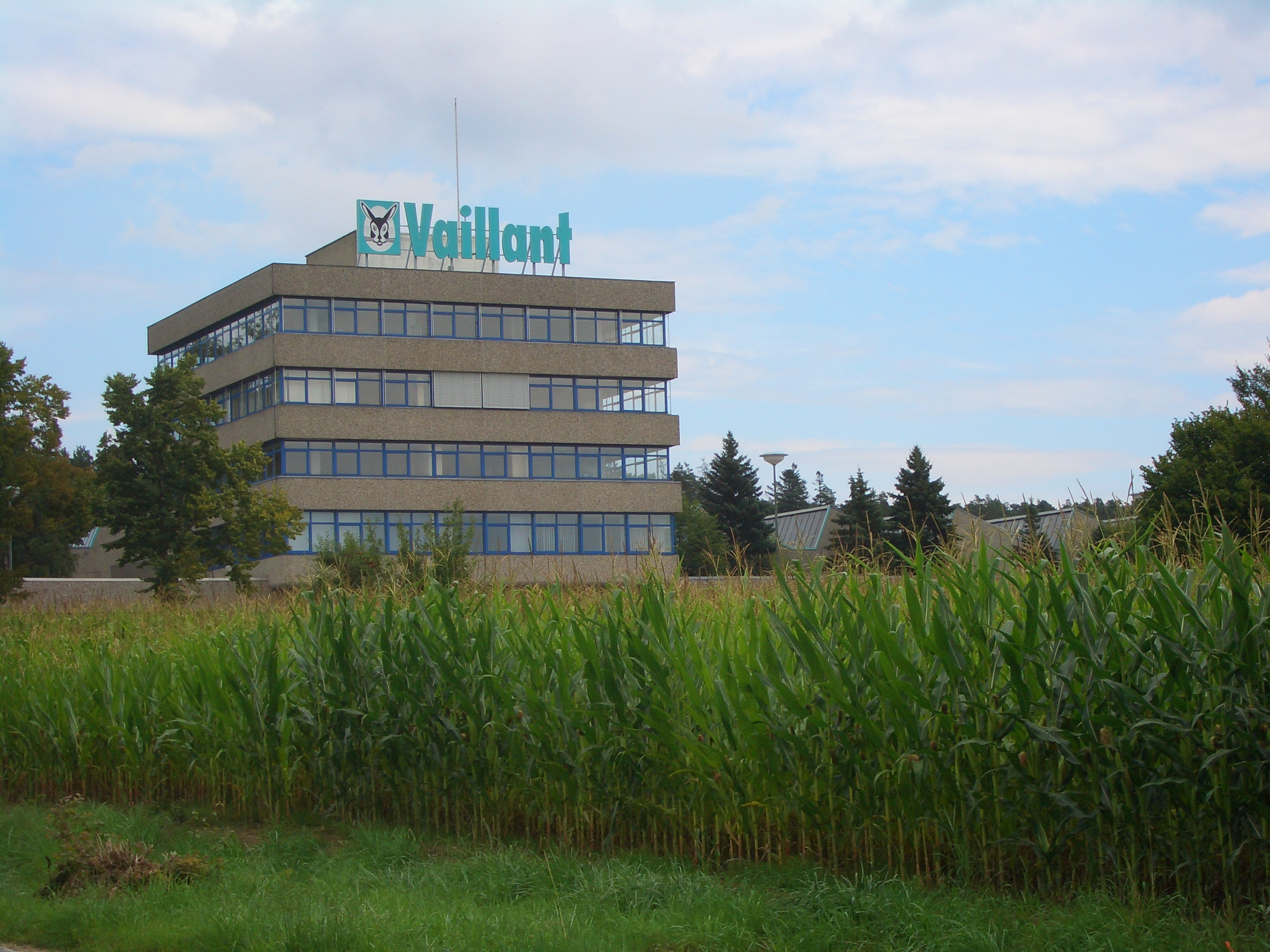 Betrieb der Firma Vaillant in Roding